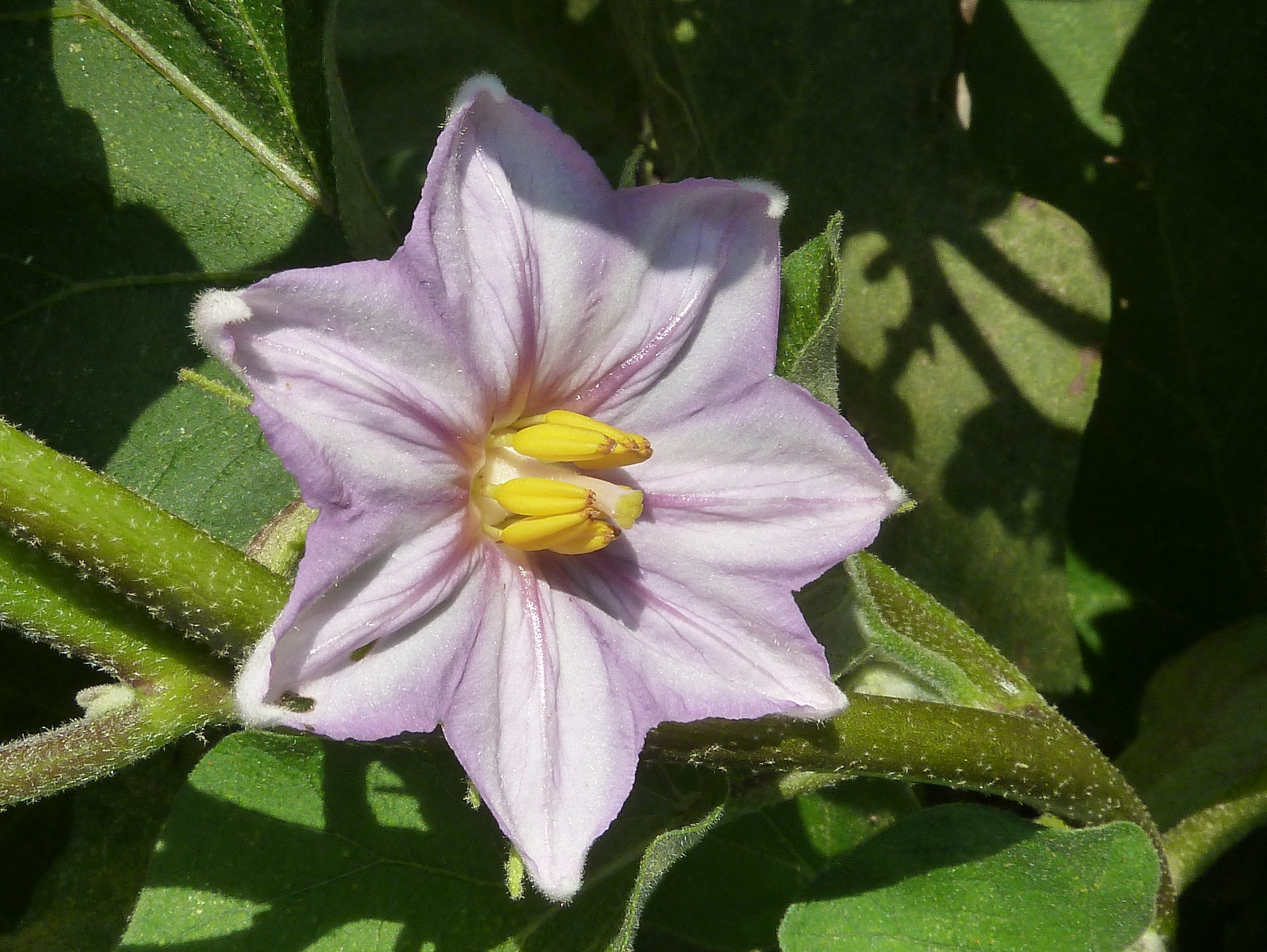 Solanum melongena (Berenjena) : Flor de 7 pétalos - El Canalillo, Albatera (Alicante, España).